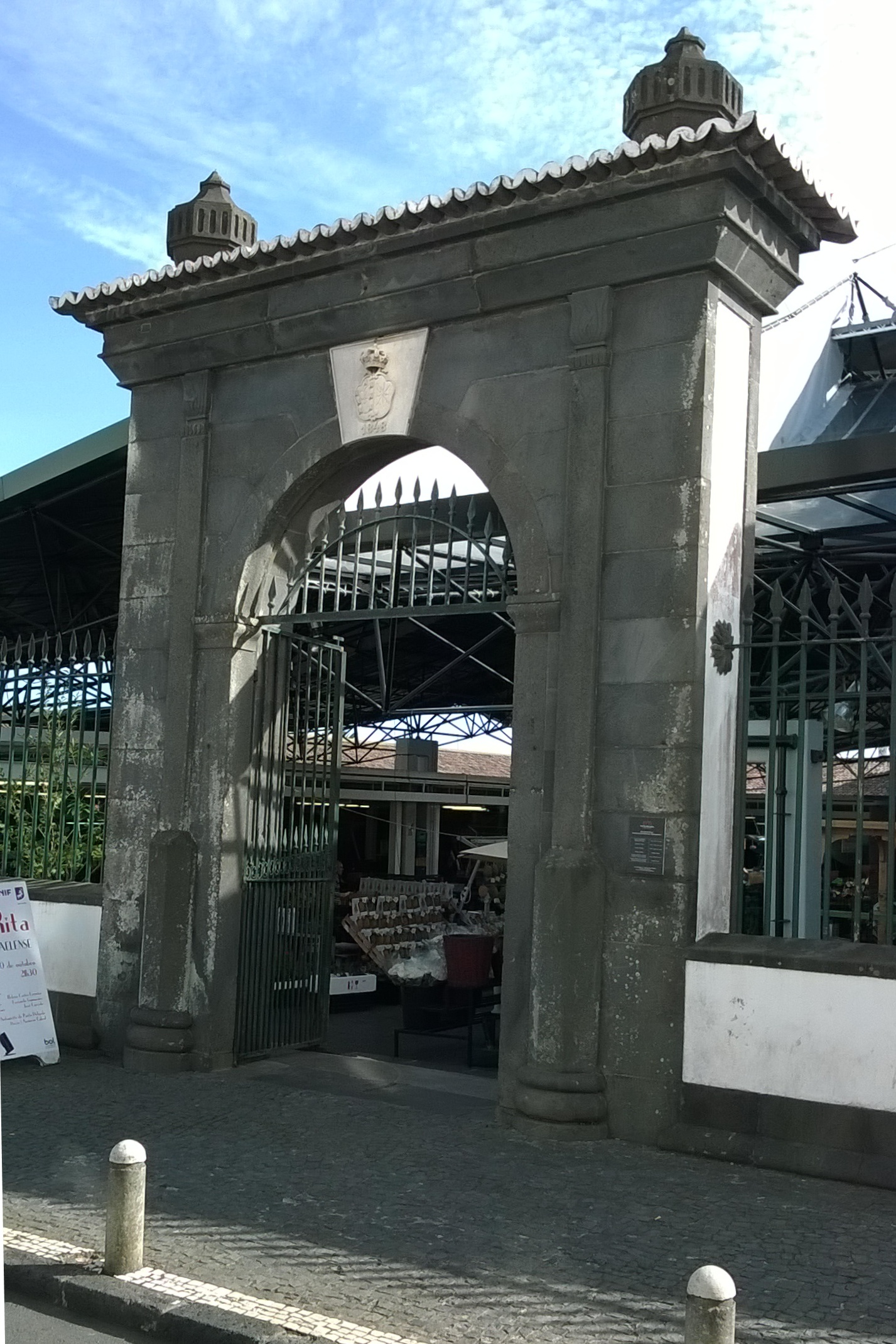 Mercado da Graça, freguesia de São Pedro, cidade e concelho de Ponta Delgada, ilha de São Miguel, Região Autónoma dos Açores, Portugal.